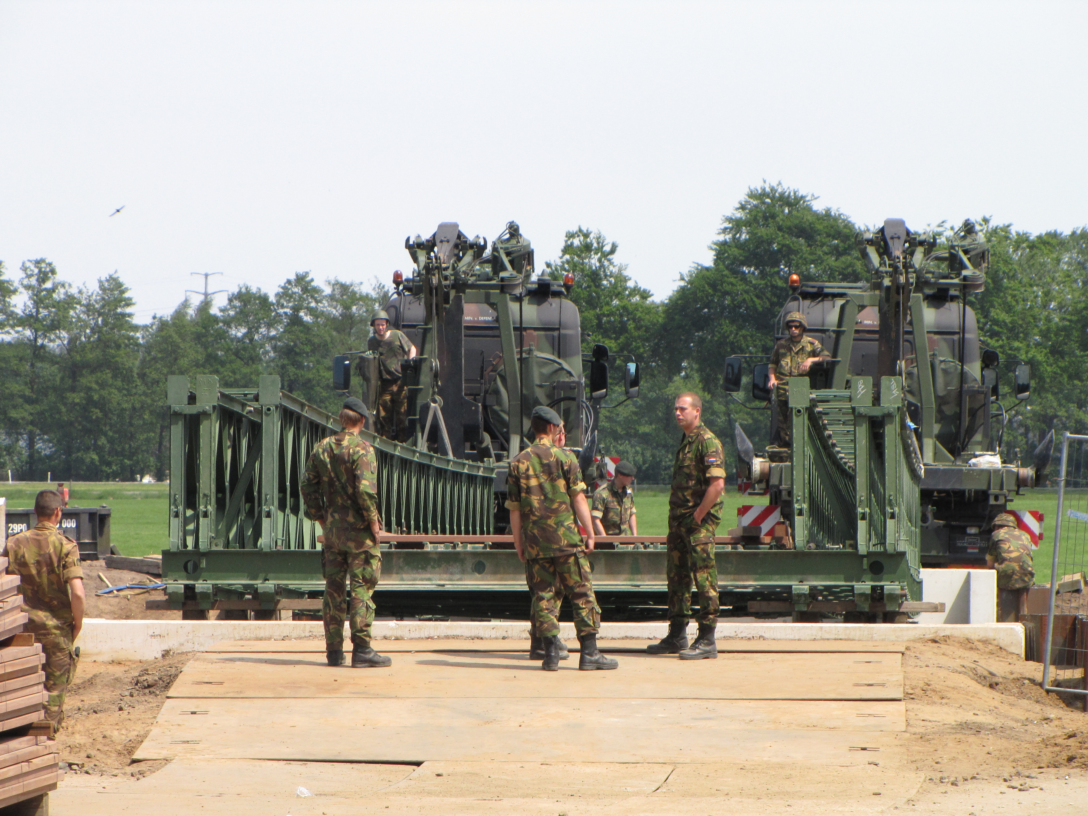 Bailybrug DRU.